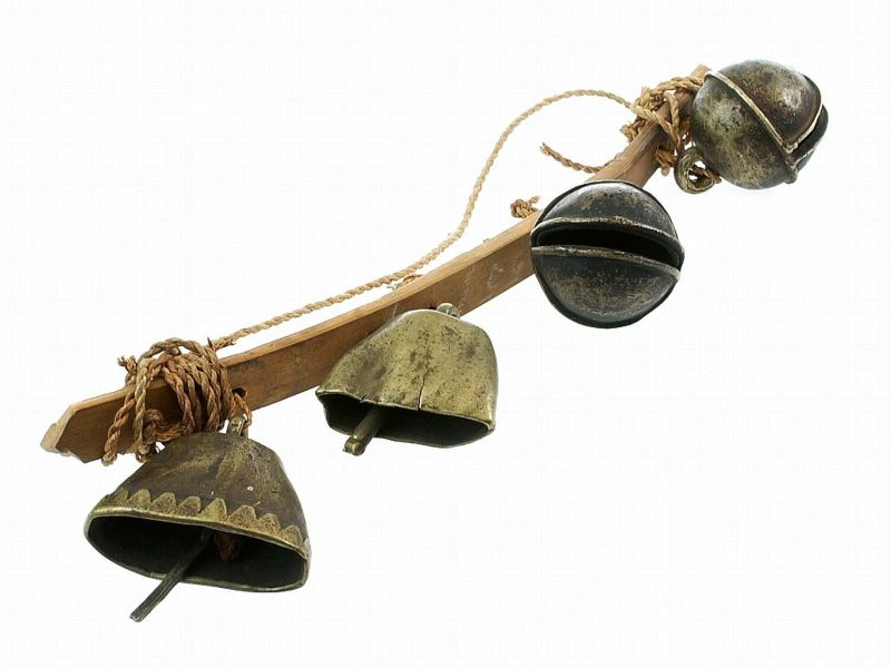 Geraasmaker. Rinkelplank van bamboe met vier bellen van messing Unknown language: Gorong-gorong